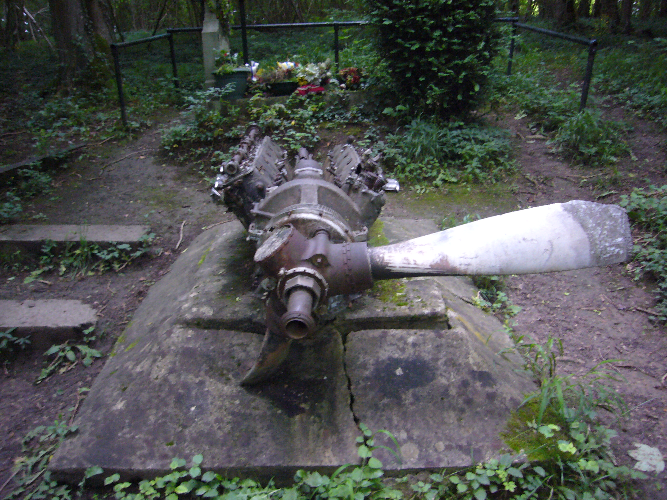 Monument de Longpont (Aisne) à la mémoire du Lieutenant André Monty, abattu en 1940 par des Bf 109 & enterré sur place au milieu des débris de son Morane-Saulnier MS.406